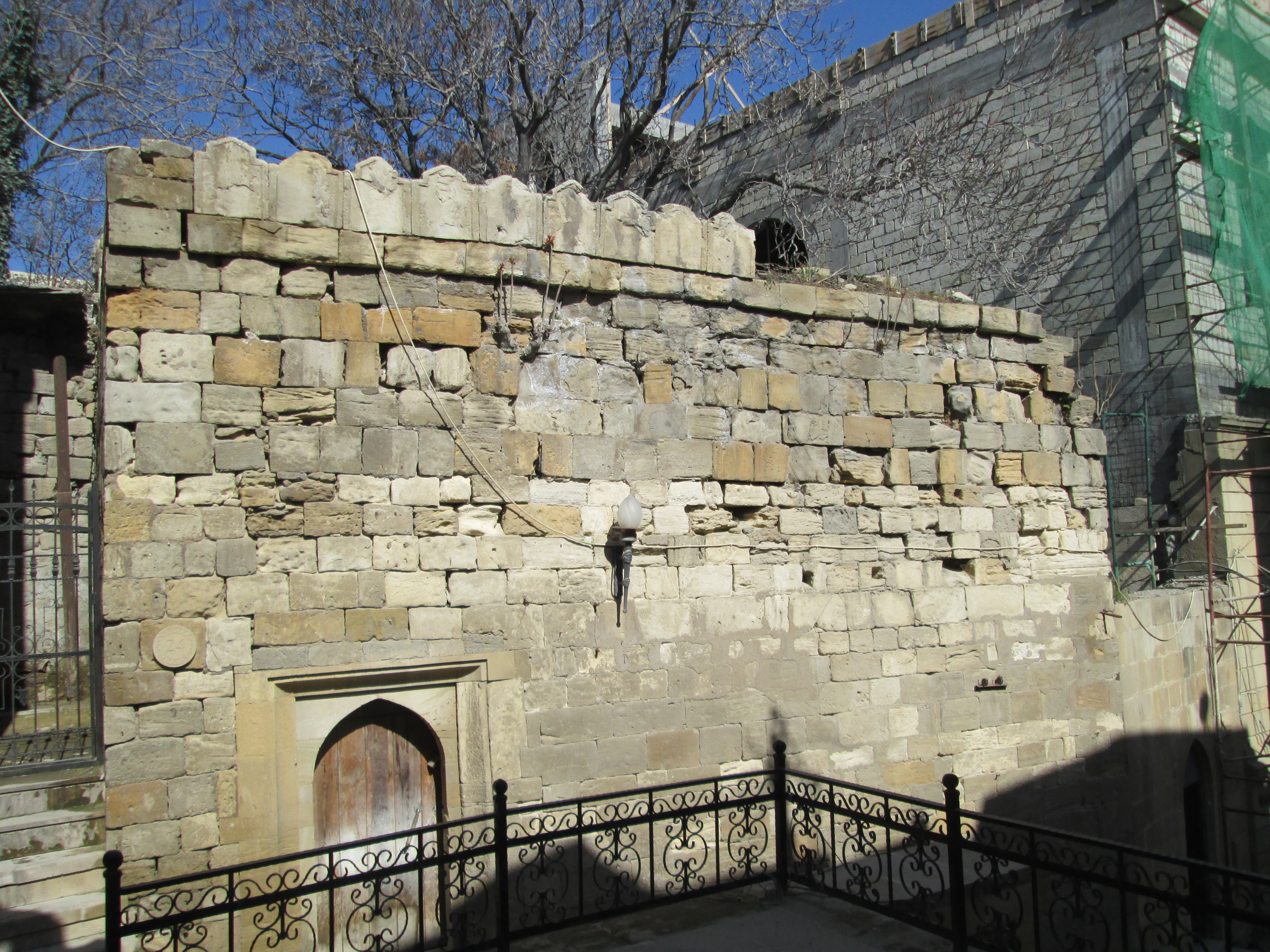 Xıdır məscidinin ikinci mərtəbəsi